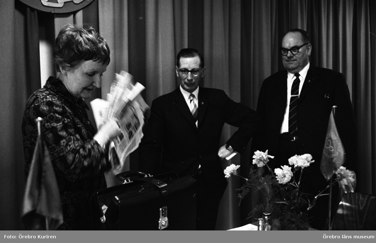 Willy Maria Lundberg medverkar vid länets Köpmannaförbunds konferens i Ormesta. Med ordförande Livsmedelshandlareförbundet G.A. Johans. Ur Örebro Kuriren.